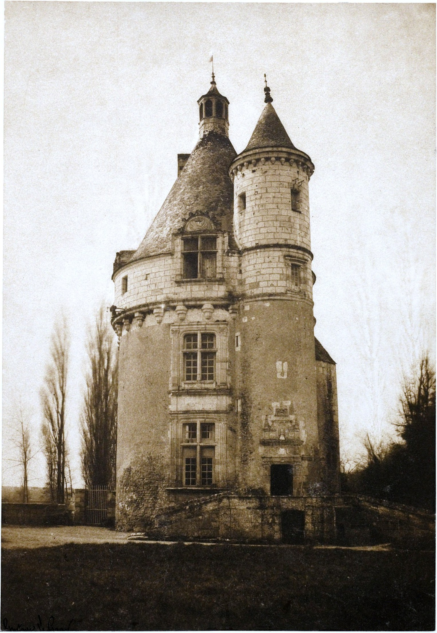 Cette photographie fait partie d'une série sur le château de Chenonceau, prise par Gustave Le Gray et Auguste Mestral. Ce cliché est effectué dans le cadre de la Mission héliographique en 1851 et commandé par la Commission des monuments historiques.